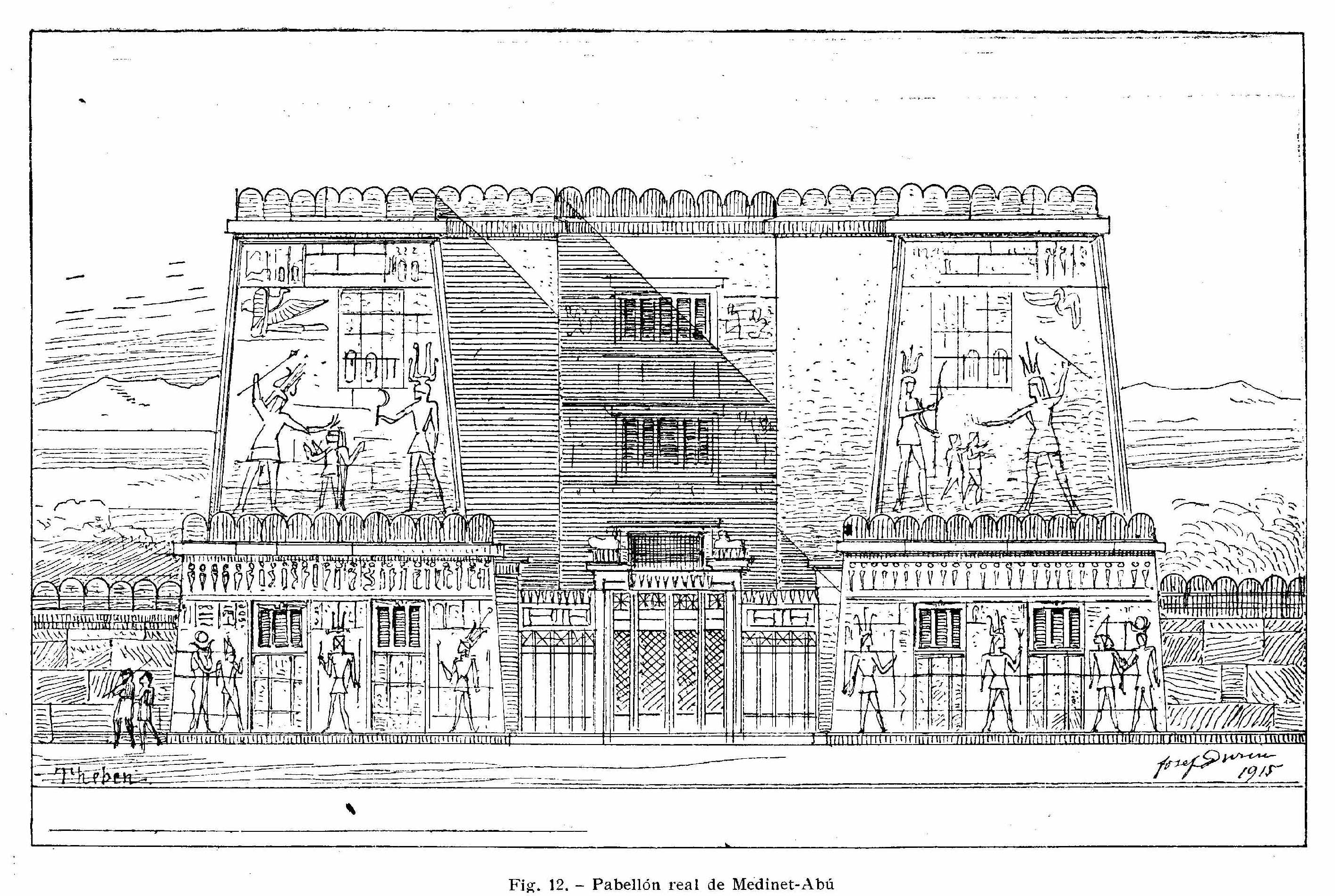 Pabellón real de Medinet-Abú (textos del dibujo en español)